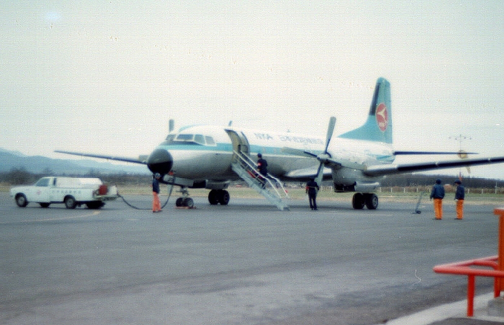 日本近距離航空のYS-11A（機体番号不明）。日本国北海道旧中標津空港で1986年頃撮影。ネガフィルムよりスキャン。